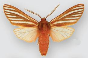 Pseudohemihyalea ambigua male